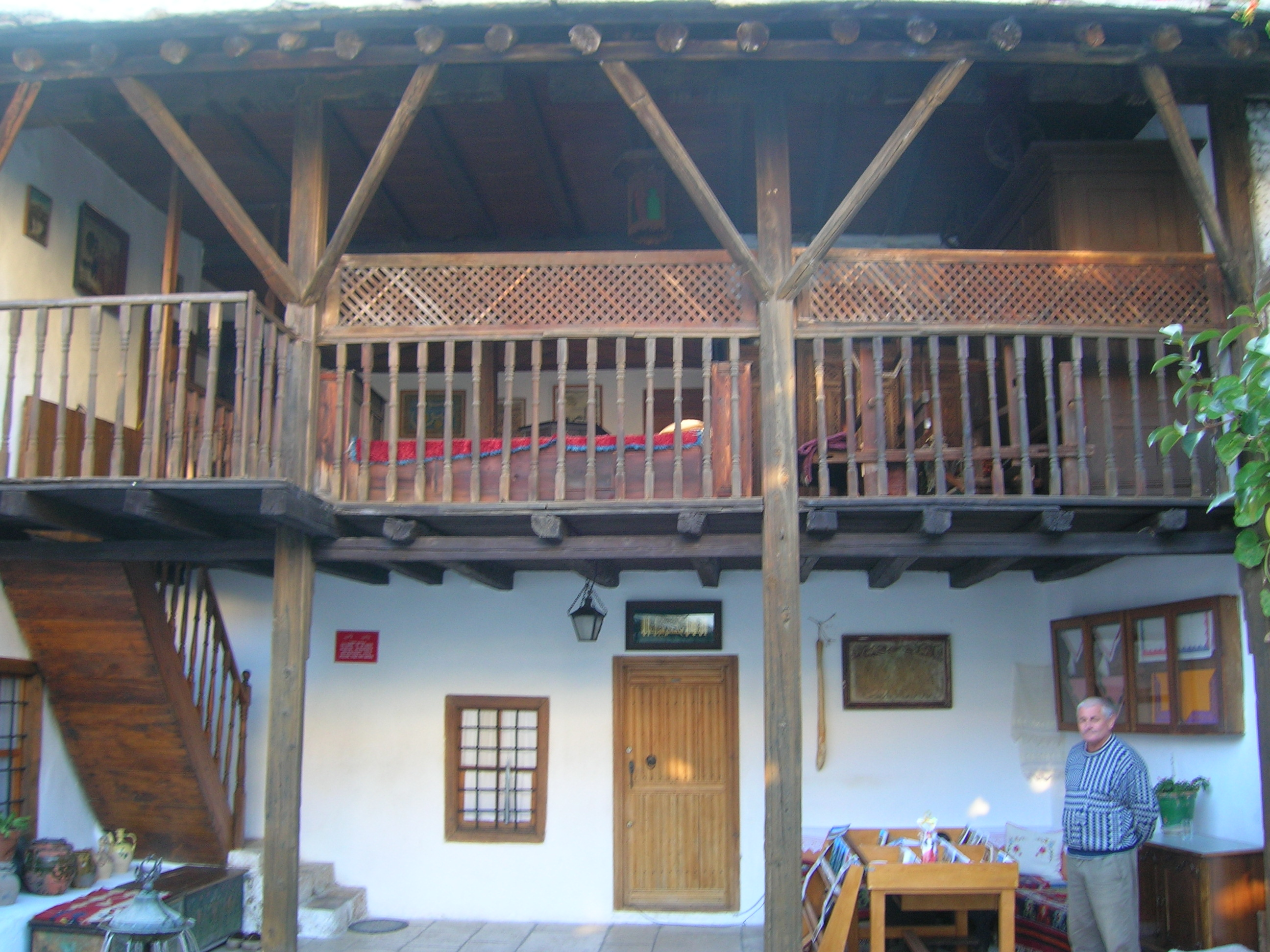 Biščević-Lakšić house, Mostar (Bosnia and Herzegovina)